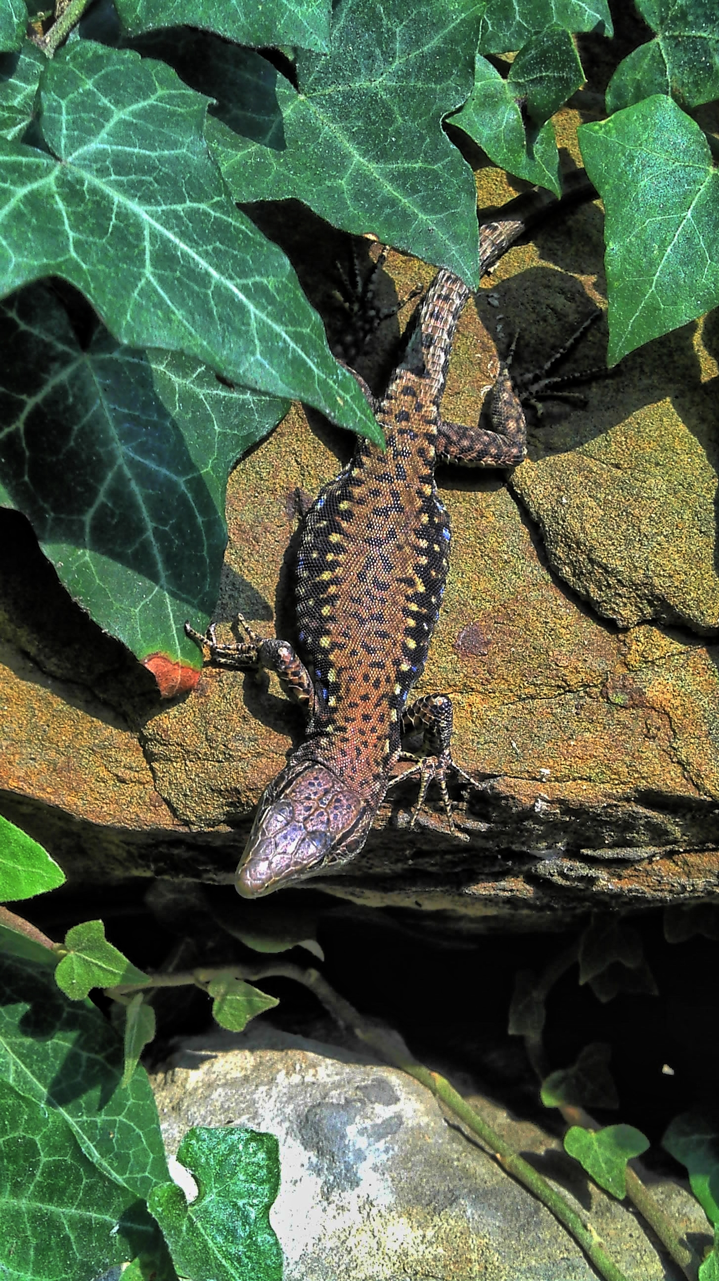 Скальная ящерица - Darevskia raddei